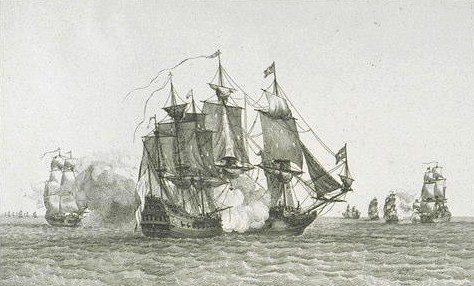 Jean Bart et Forsin convoyant une flotte du Havre à Brest (par Yves-Marie Le Gouaz [1742-1816], musée du Louvre département des Arts graphiques)